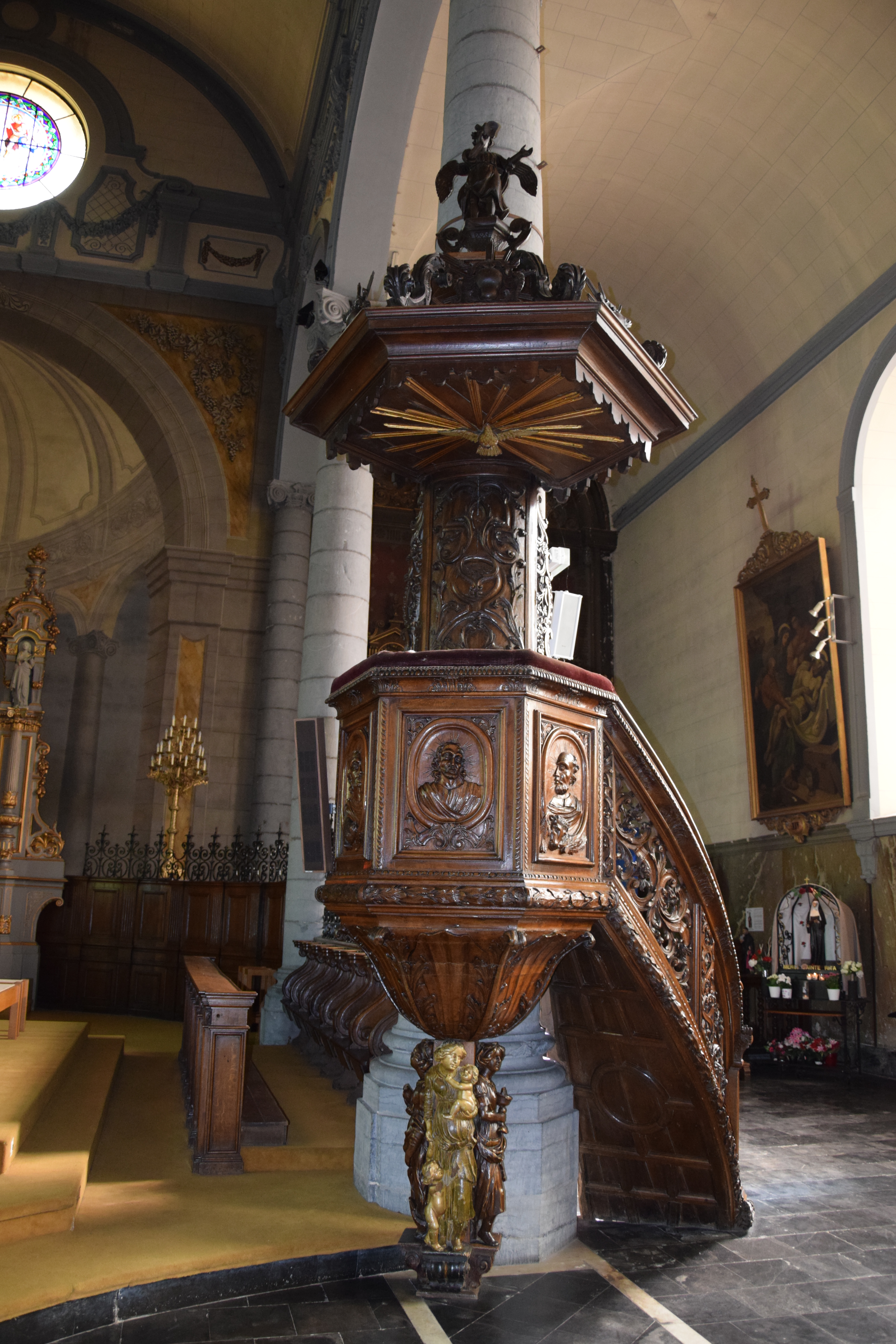 Église Saint-Martin de Solesmes